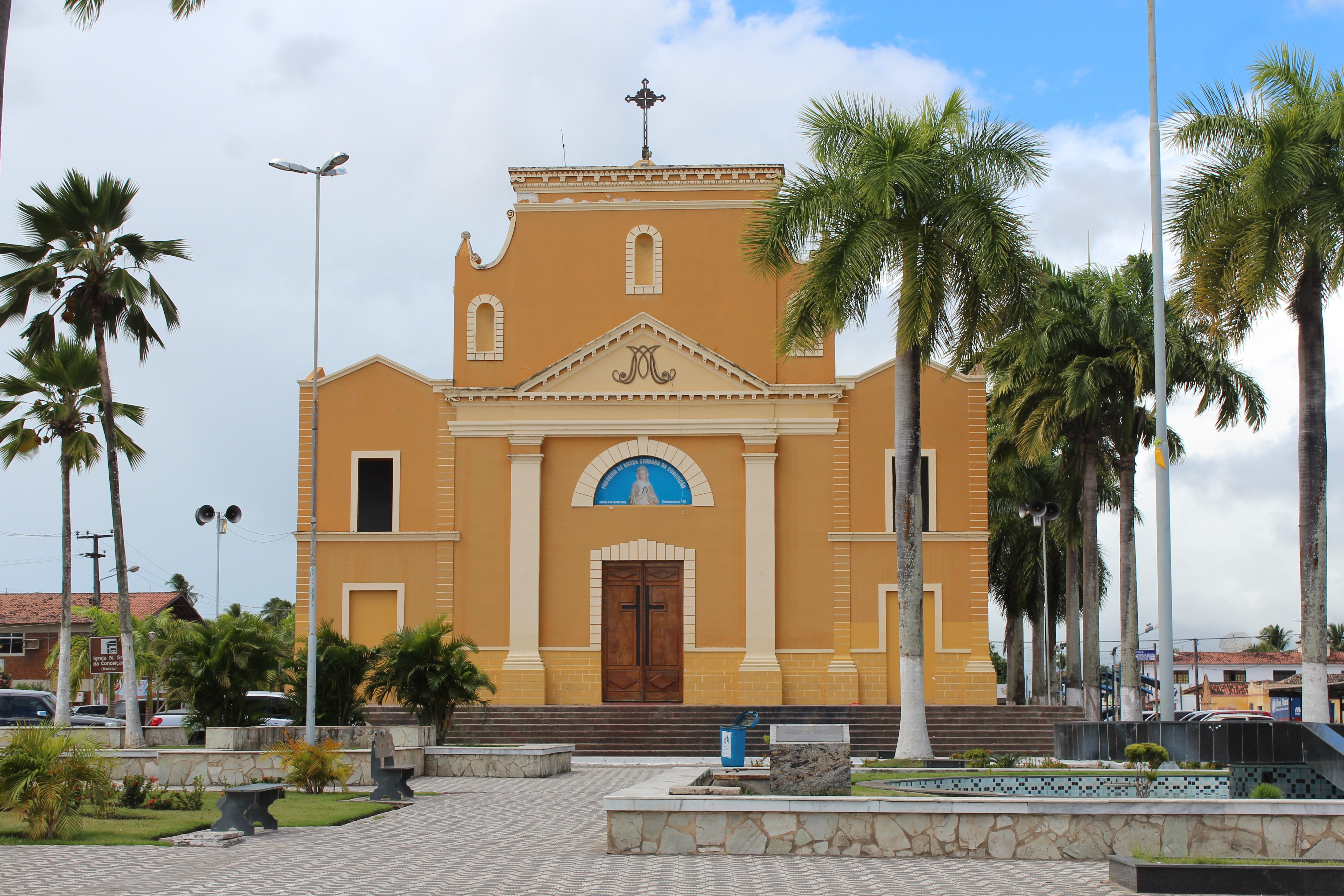 Igreja Matriz de Nossa Senhora da Conceição, da Arquidiocese de Natal, em Canguaretama, Rio Grande do Norte, Brasil